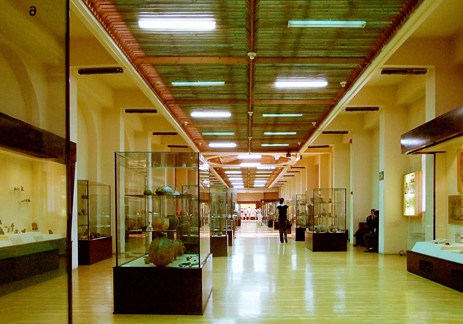 Muzeum Cywilizacji Anatolijskich w Ankarze; Museum of Anatolian Civilizations in Ankara